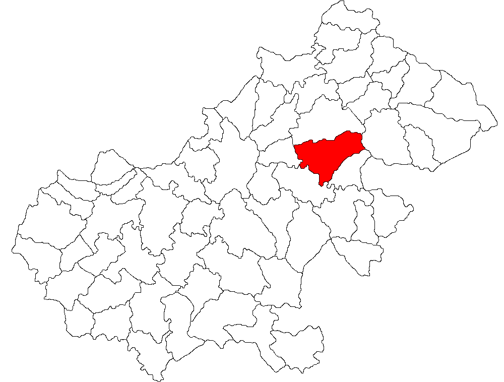 Categorie:Hărţi ale judeţului Satu Mare